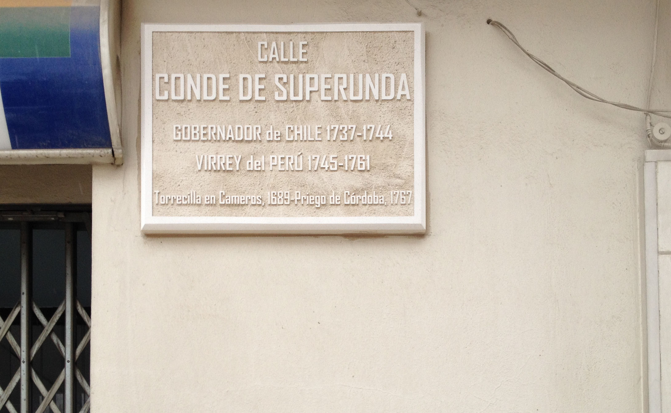 Fotografía de la placa de la calle Conde de Superunda en Priego de Córdoba dedicada al conde homónimo.